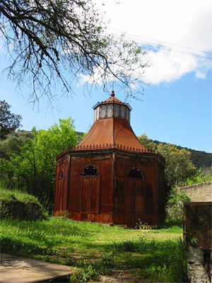 Esta es una fuente de aguagria, en la localidad cordobesa de Villaharta.